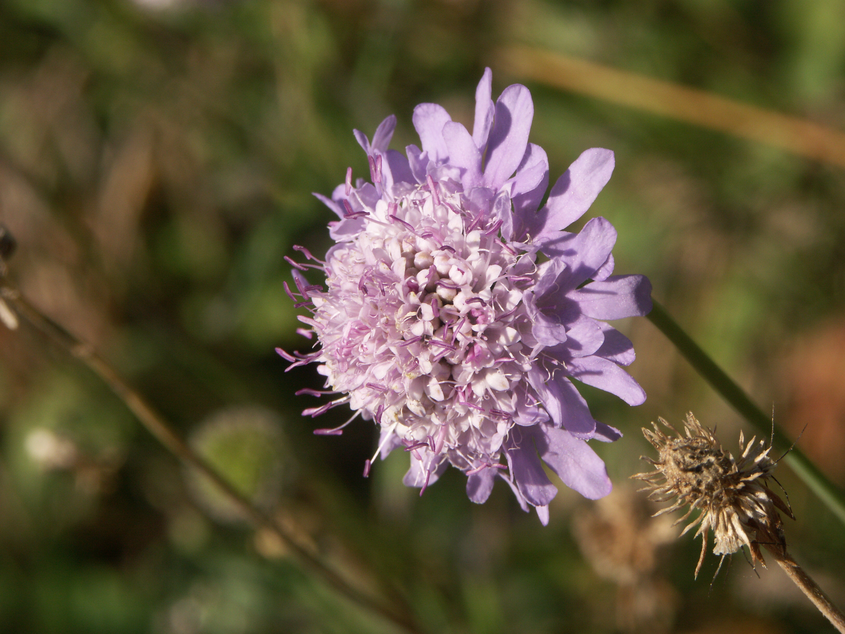 Tauben-Skabiose (Scabiosa columbaria), Berlin, Botanischer Garten